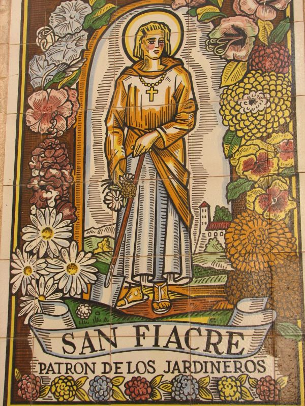 Saint Fiacre mural, Málaga